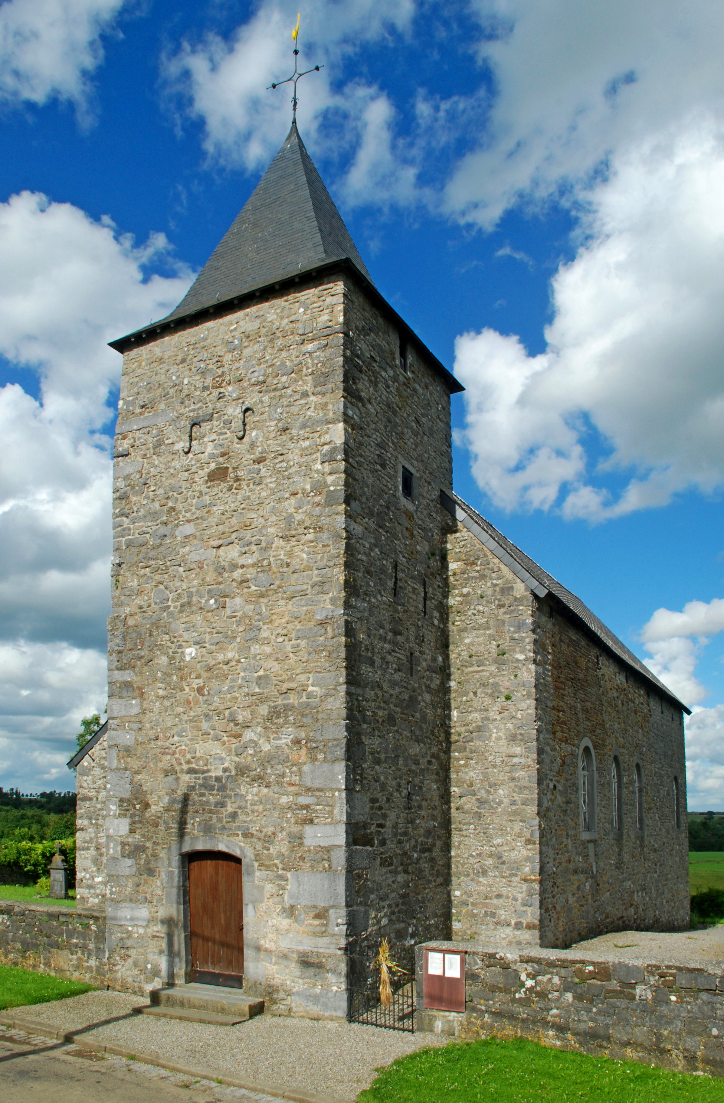 Belgique - Province de Namur - Maillen - Église Saint-Martin d'Ivoy